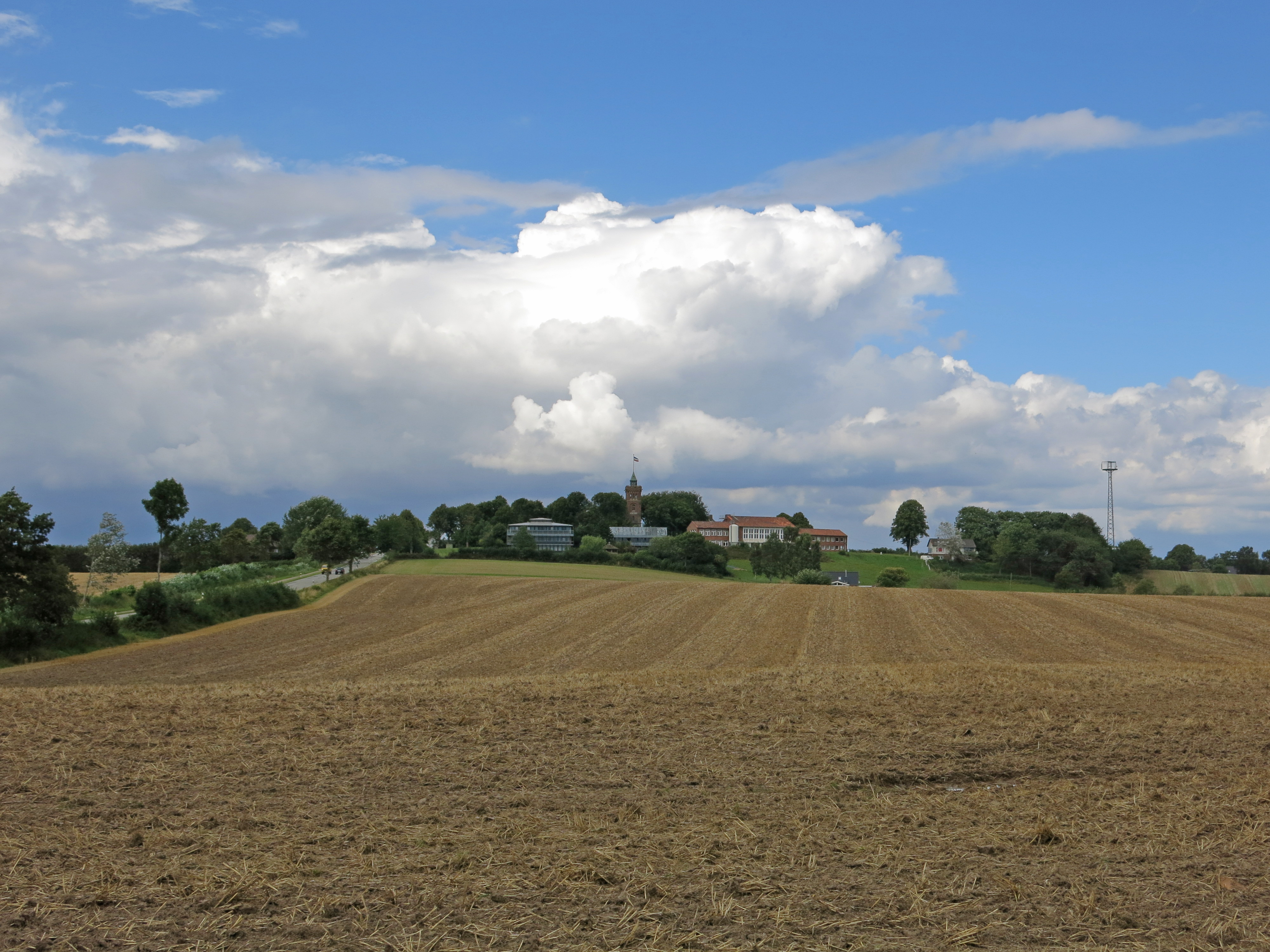 Der Scheersberg (70 m) bei Steinbergkirche im Nordosten Schleswig-Holsteins. Aufnahme von Süden.